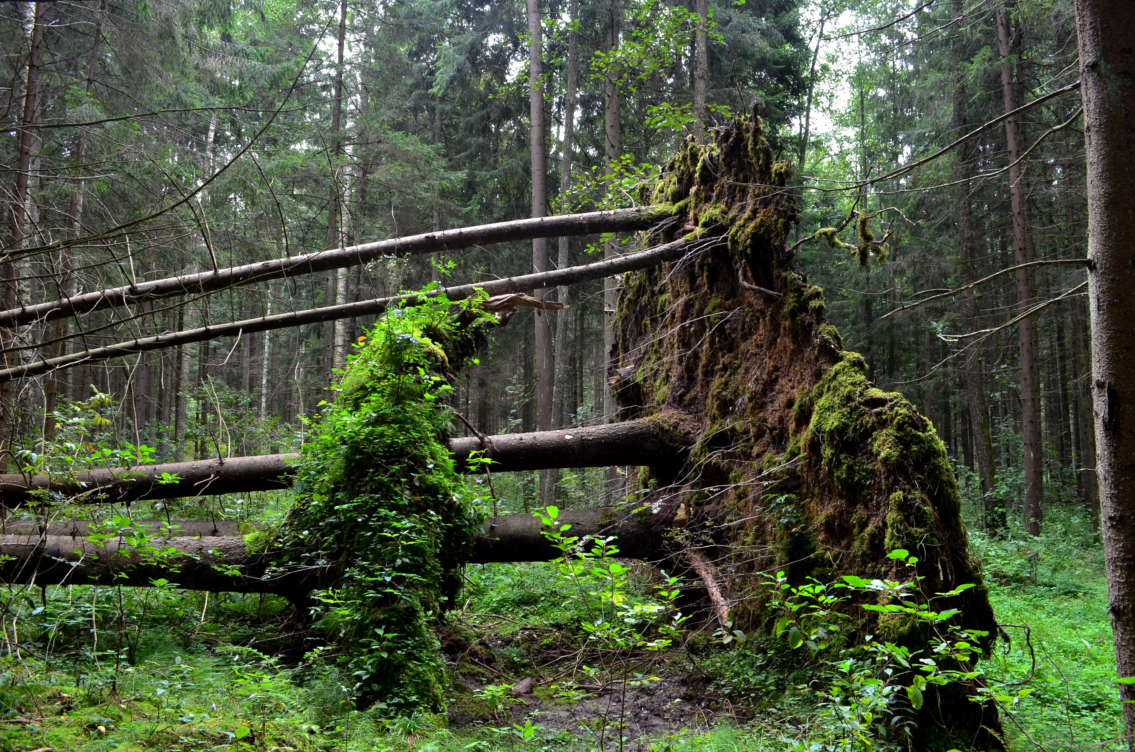 Kazlų Rūdos miškų griaumenys (Ąžuolų Būdos apylinkės), Kazlų Rūdos sav.